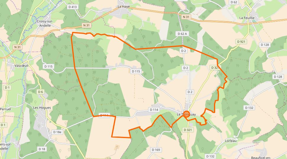 Carte du Tronquay avec le tracé des limites communales. This map may be incomplete, and may contain errors. Don't rely solely on it for navigation.